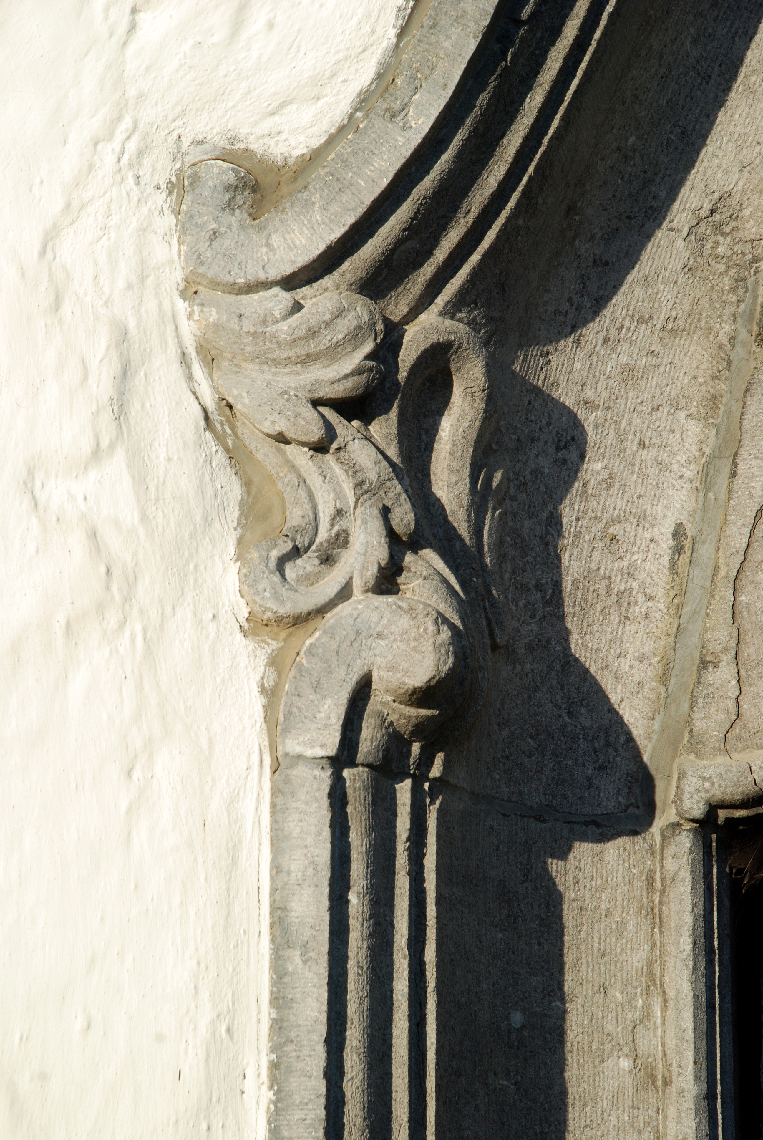 Belgique - Brabant wallon - Chapelle Notre-Dame des Affligés de Ways